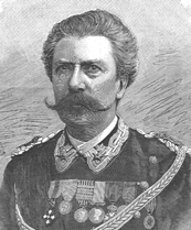 Generale e politico italiano, senatore e ministro del Regno d'Italia